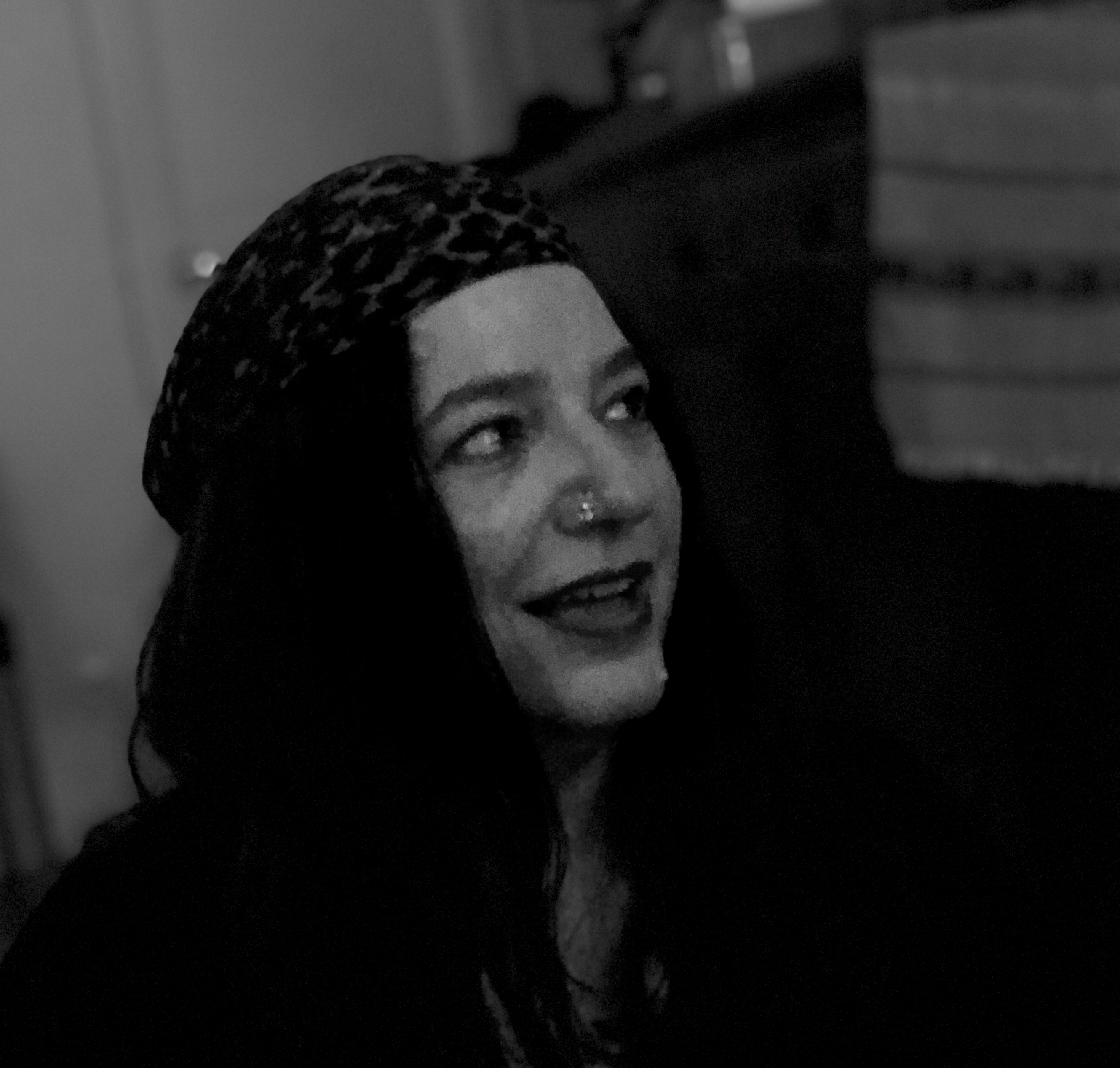 Ghazel, photographe et plasticienne.